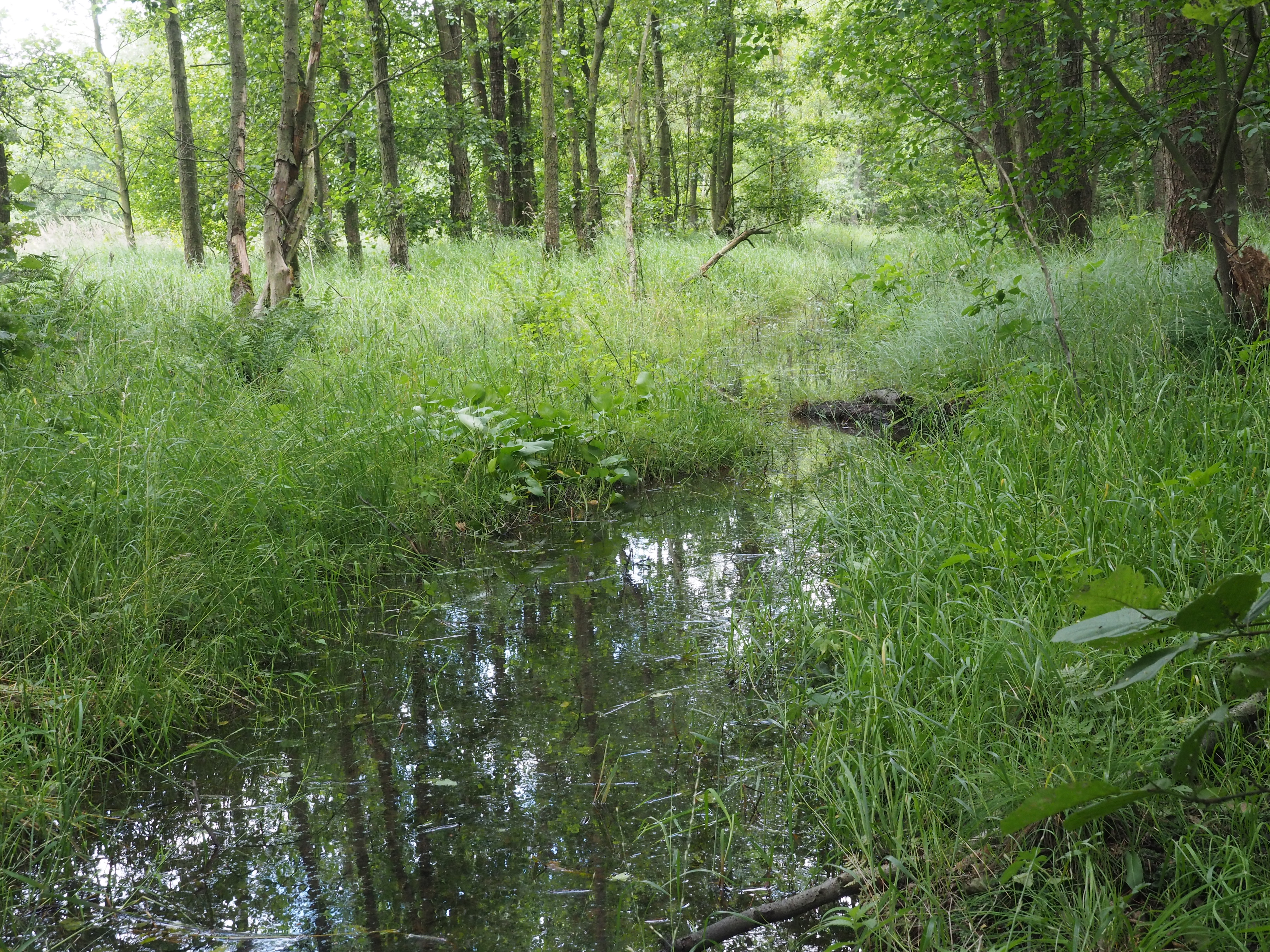 Die Ilster auf dem Truppenübungsplatz Munster-Nord kurz vor der Mündung in die Örtze.